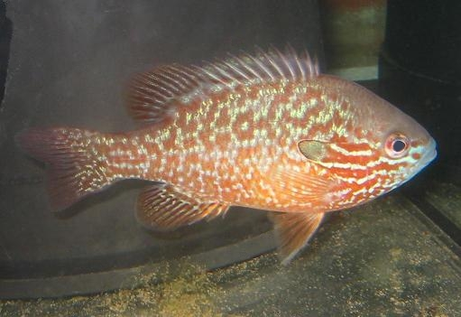 Groß-Ohr Sonnenbarsch, wahrscheinlich (Lepomis megalotis peltastes)